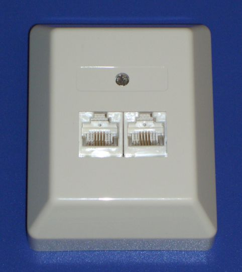 UAE mit 2 Buchsen, Aufputz-Ausführung